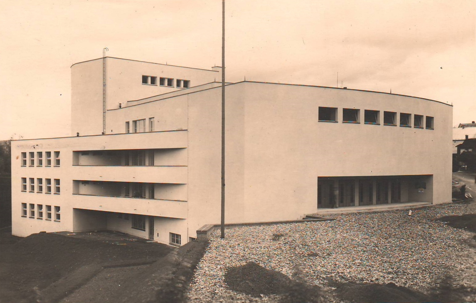 Ústí nad Orlicí, Roškotovo divadlo na dobové pohlednici.